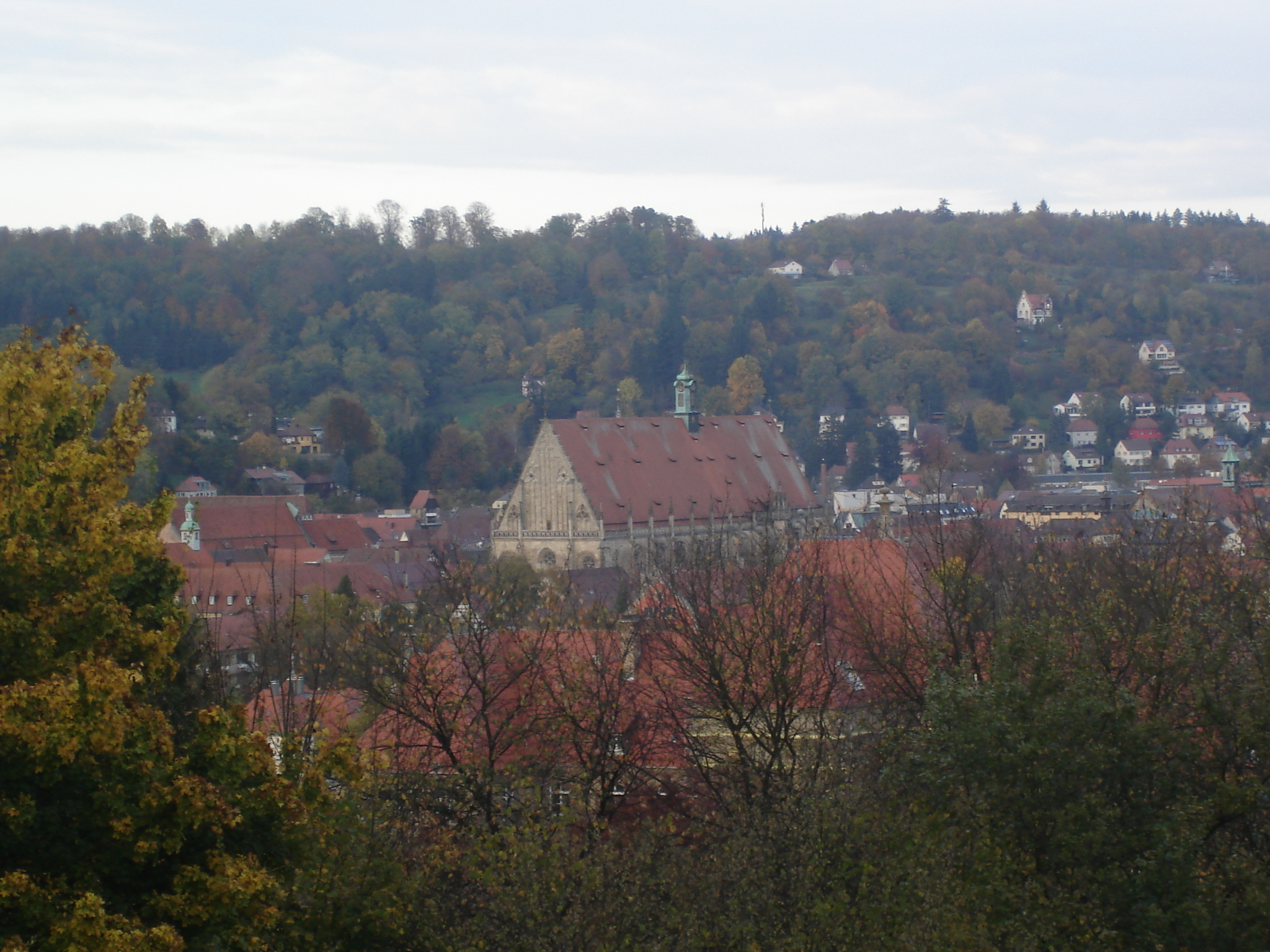 Altstadt von Schwäbisch Gmünd, vom Straßdorfer Berg aus gesehen